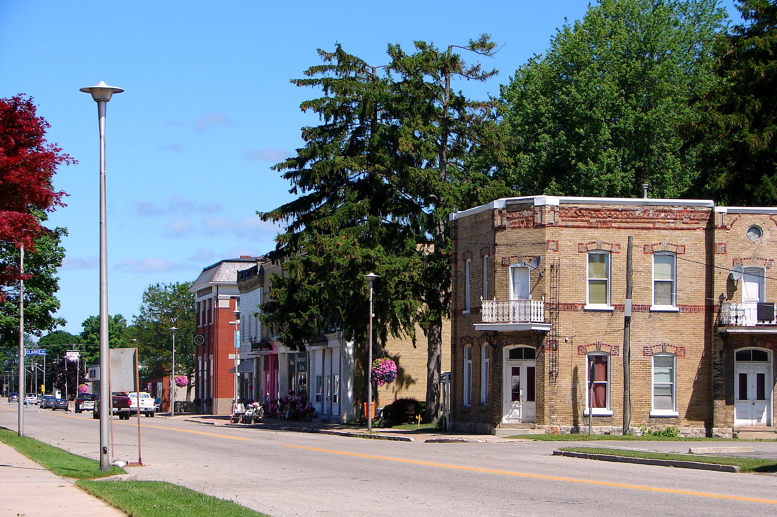 Rodney, Ontario, Canada